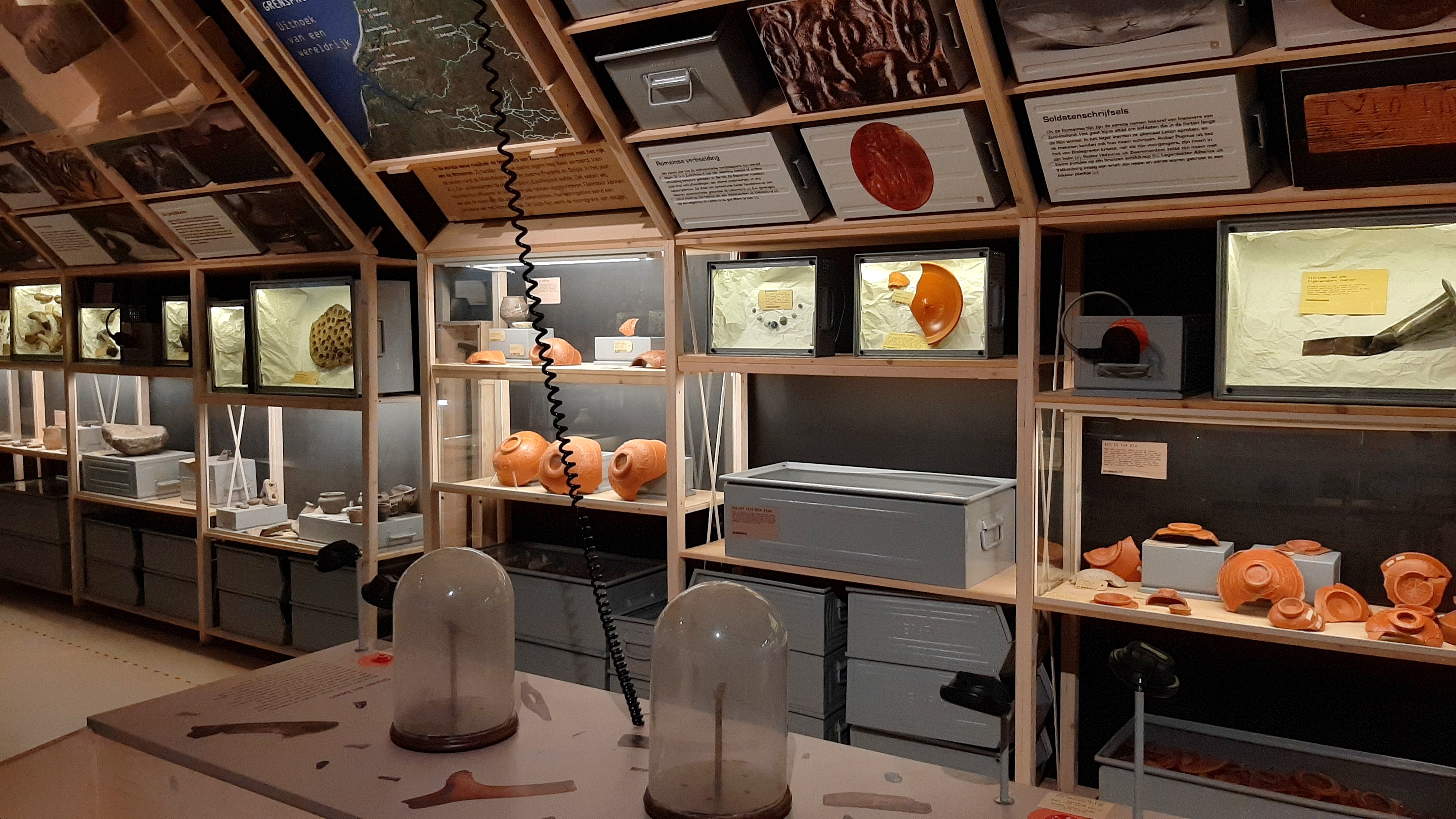 Archeon, Archeologisch Themapark in Alphen aan den Rijn (Zuid-Holland).